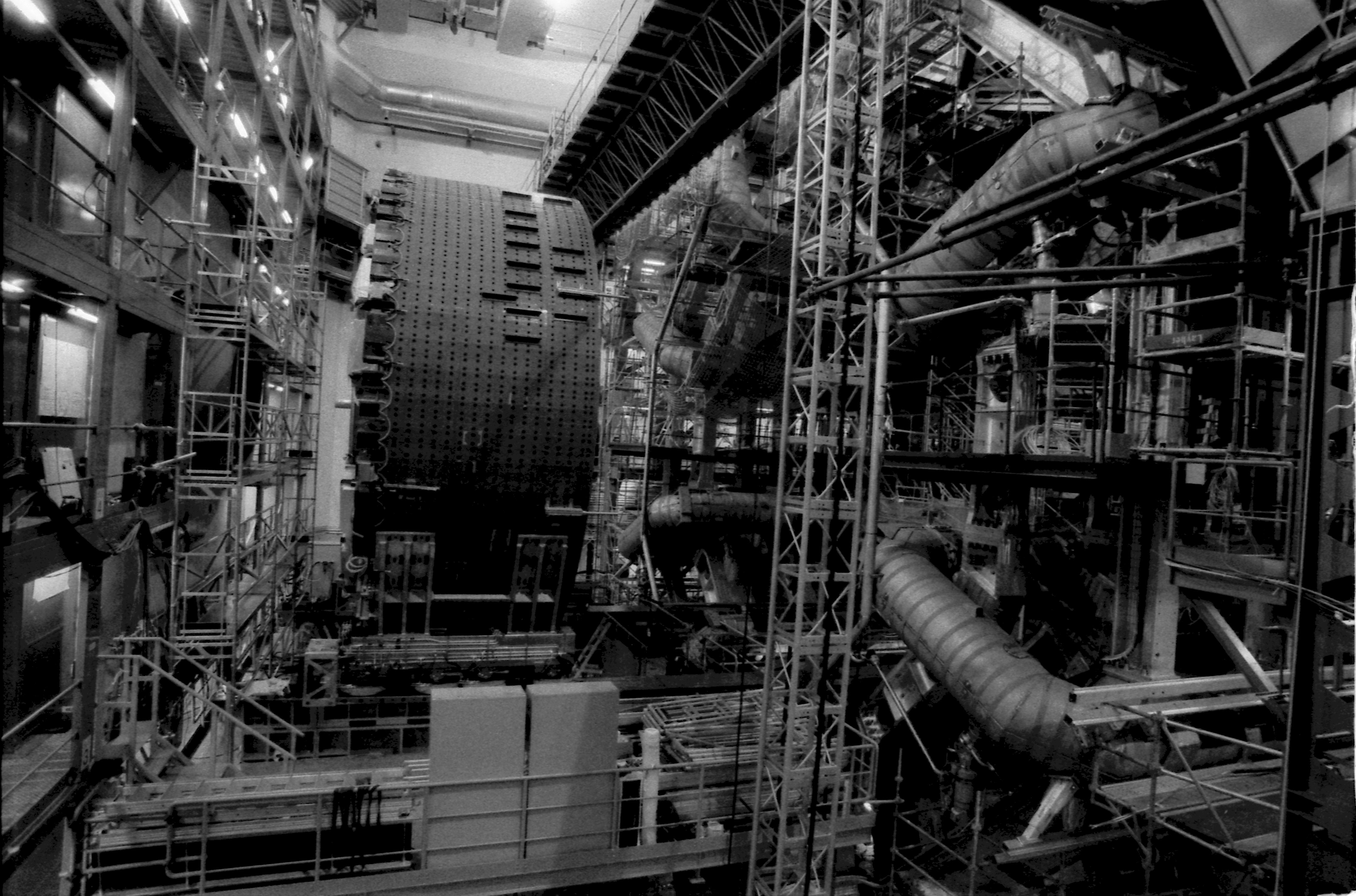 CERN: ATLAS et le Microcosme